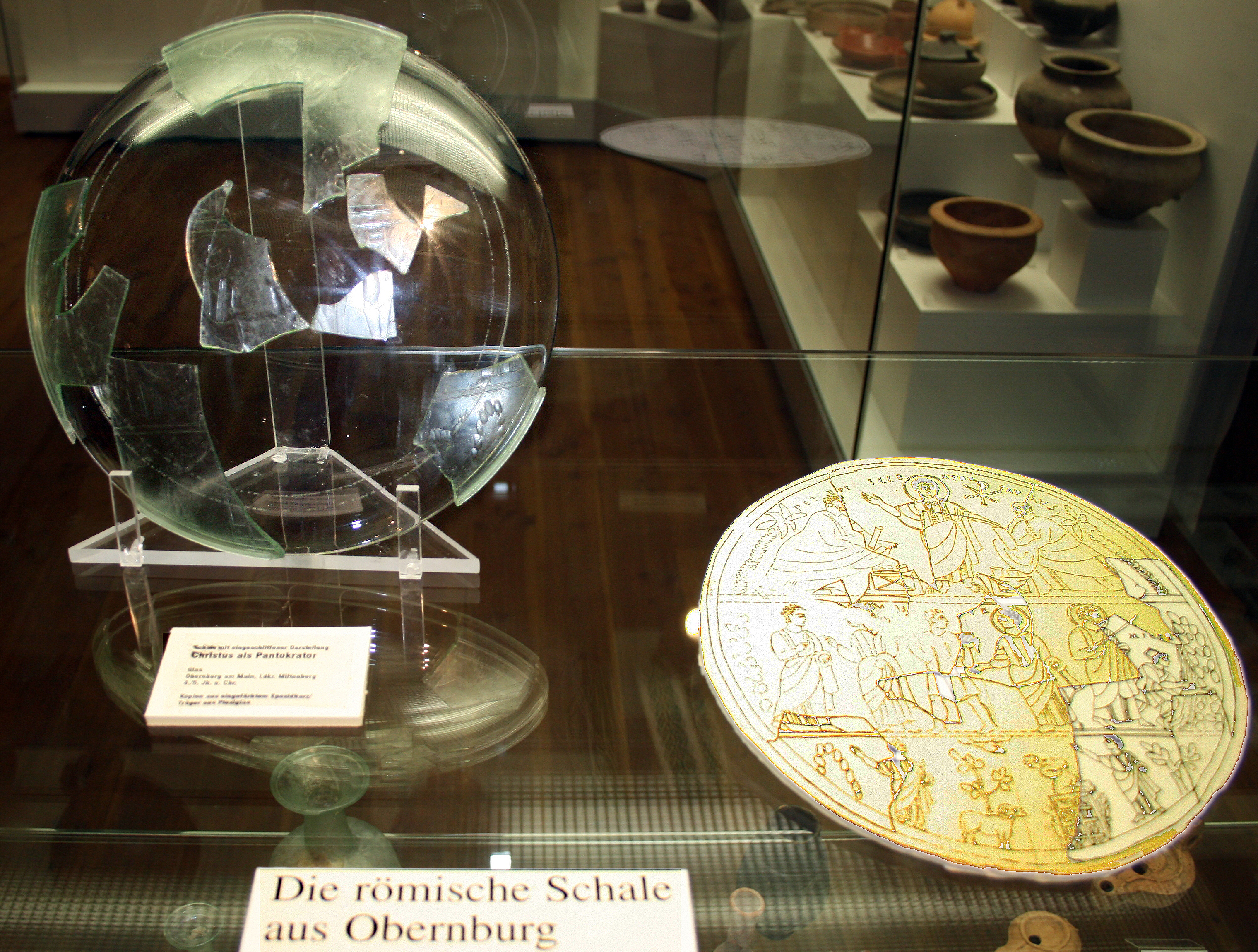 Spätrömische Glasschale aus Obernburg am Main, ausgestellt im Römermuseum Obernburg.